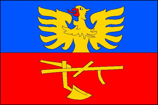 Vlajka obce Komorní Lhotka